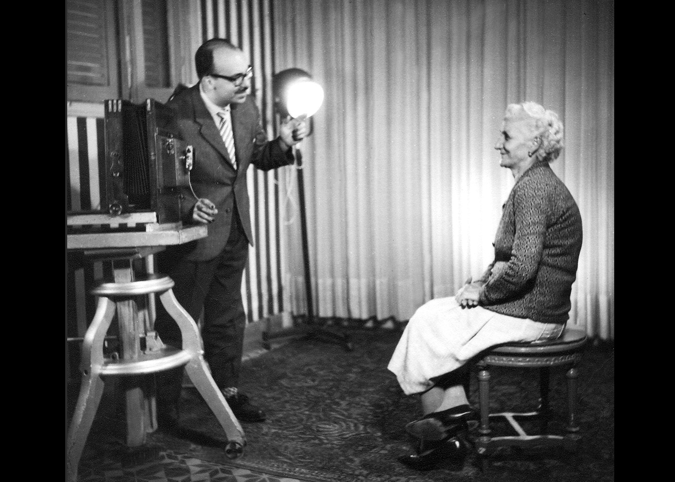 Autorretrato en estudio de Luis Victorino Savelli 1965